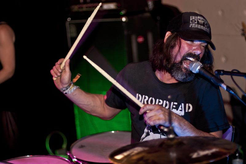 Edgar Livengood, batería de Jucifer, actuando en directo en Gijón (Asturias).